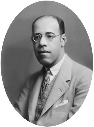 Mário de Andrade at age 35, 1928.